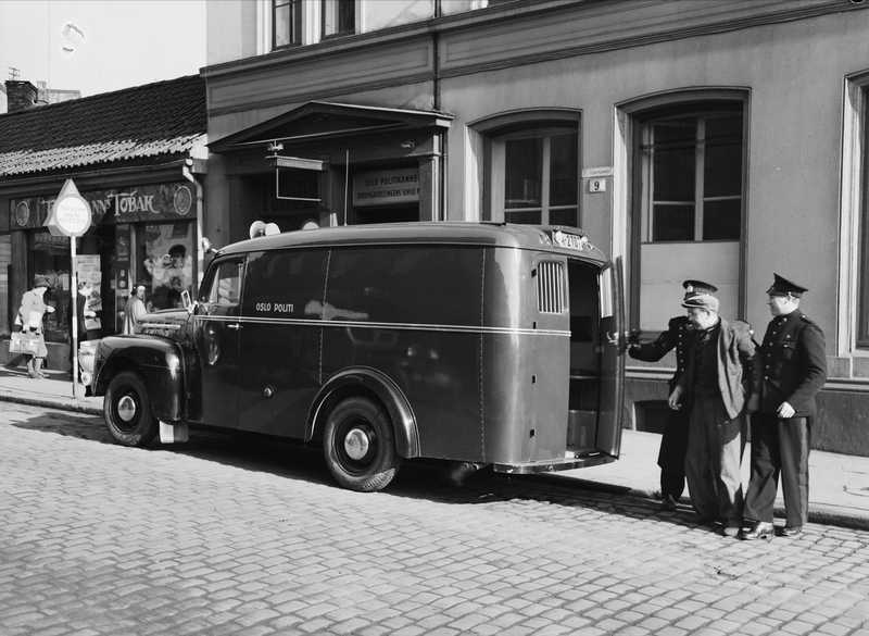 Svartemarje Oslo 1952